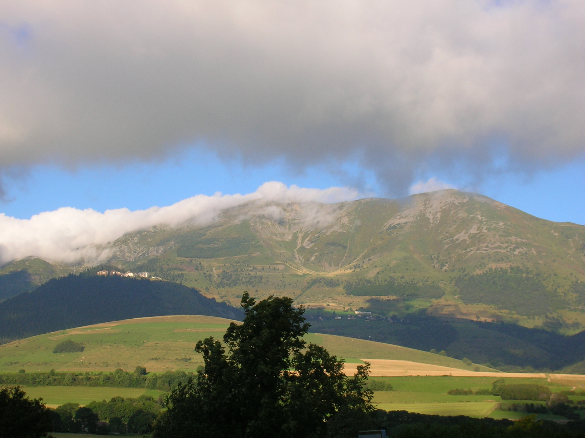 panorama depuis l'église de Pierre-Châtel. Peut-être : Combursière et La Chaud, Saint-Honoré, Isère, Rhone Alpes, France.